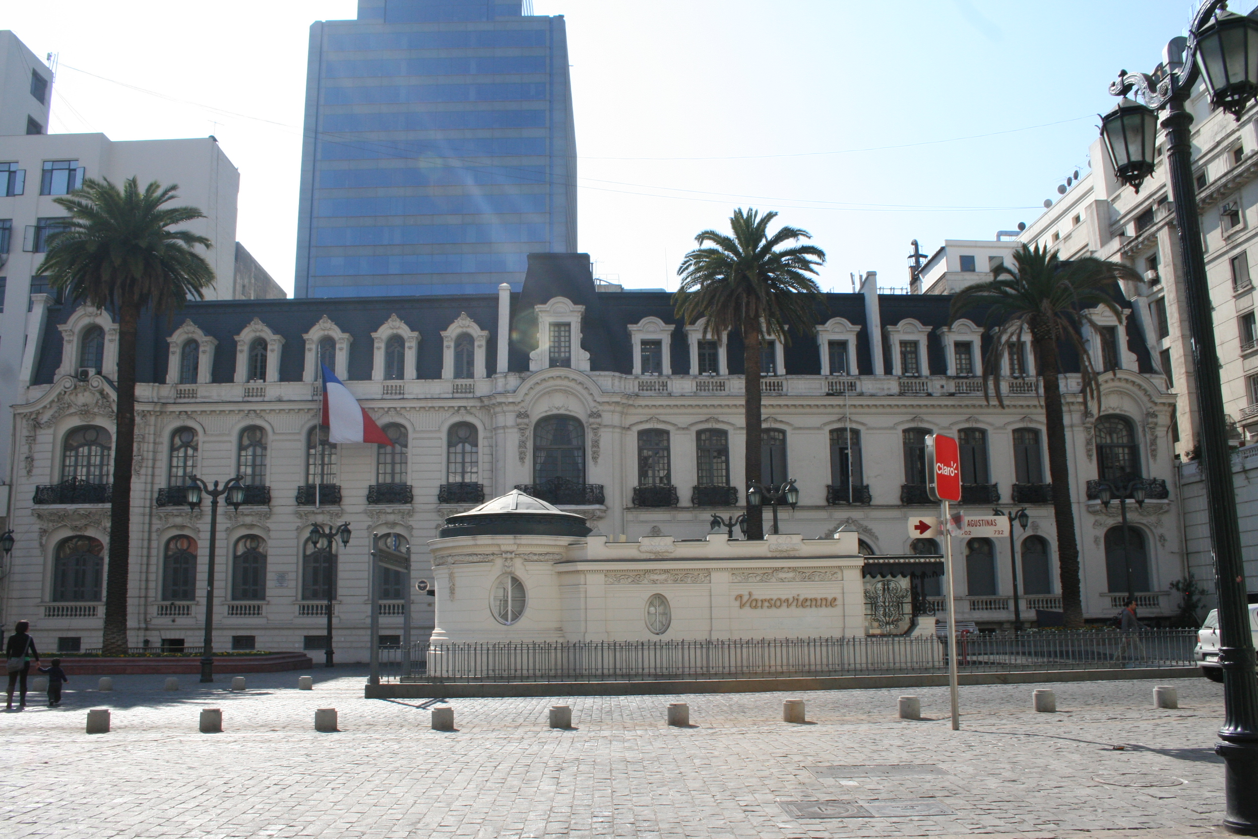 Frente del Palacio Subercaseaux. This is a photo of a national monument in Chile: 815